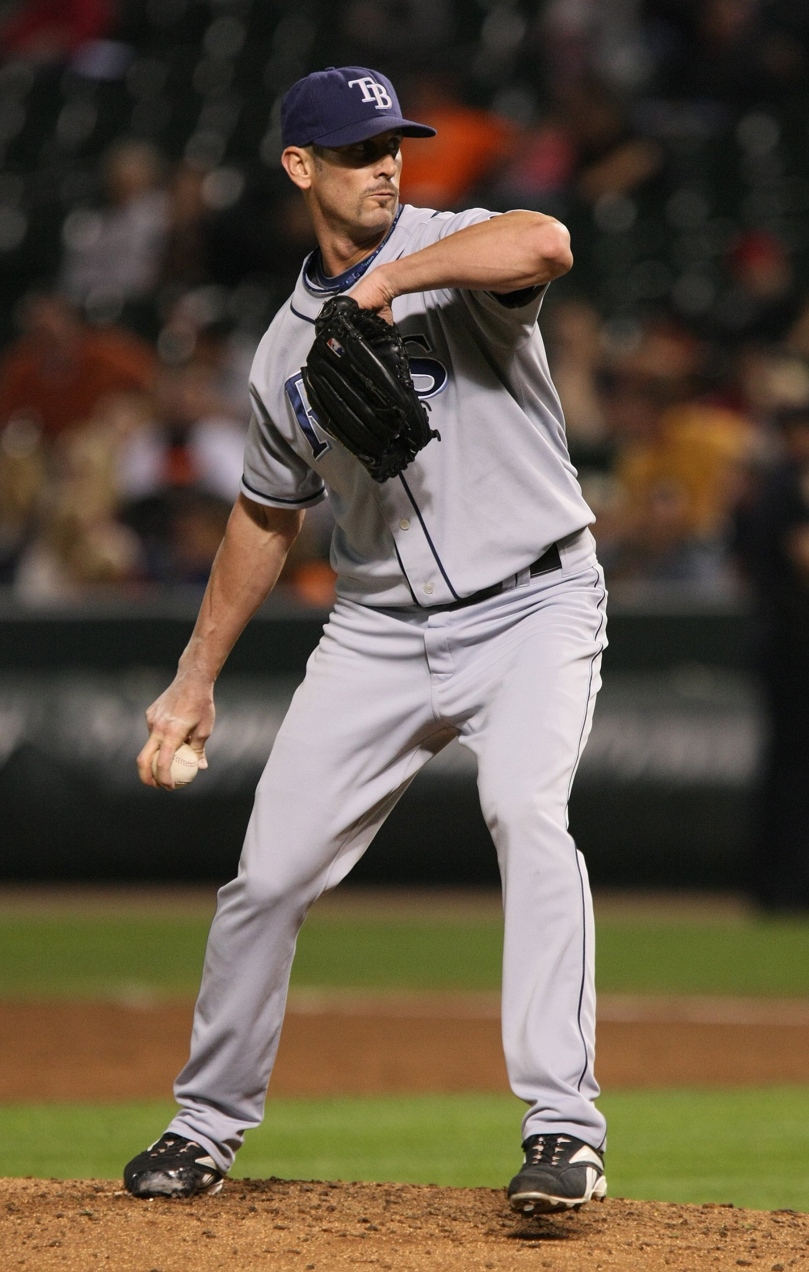 Grant Balfour